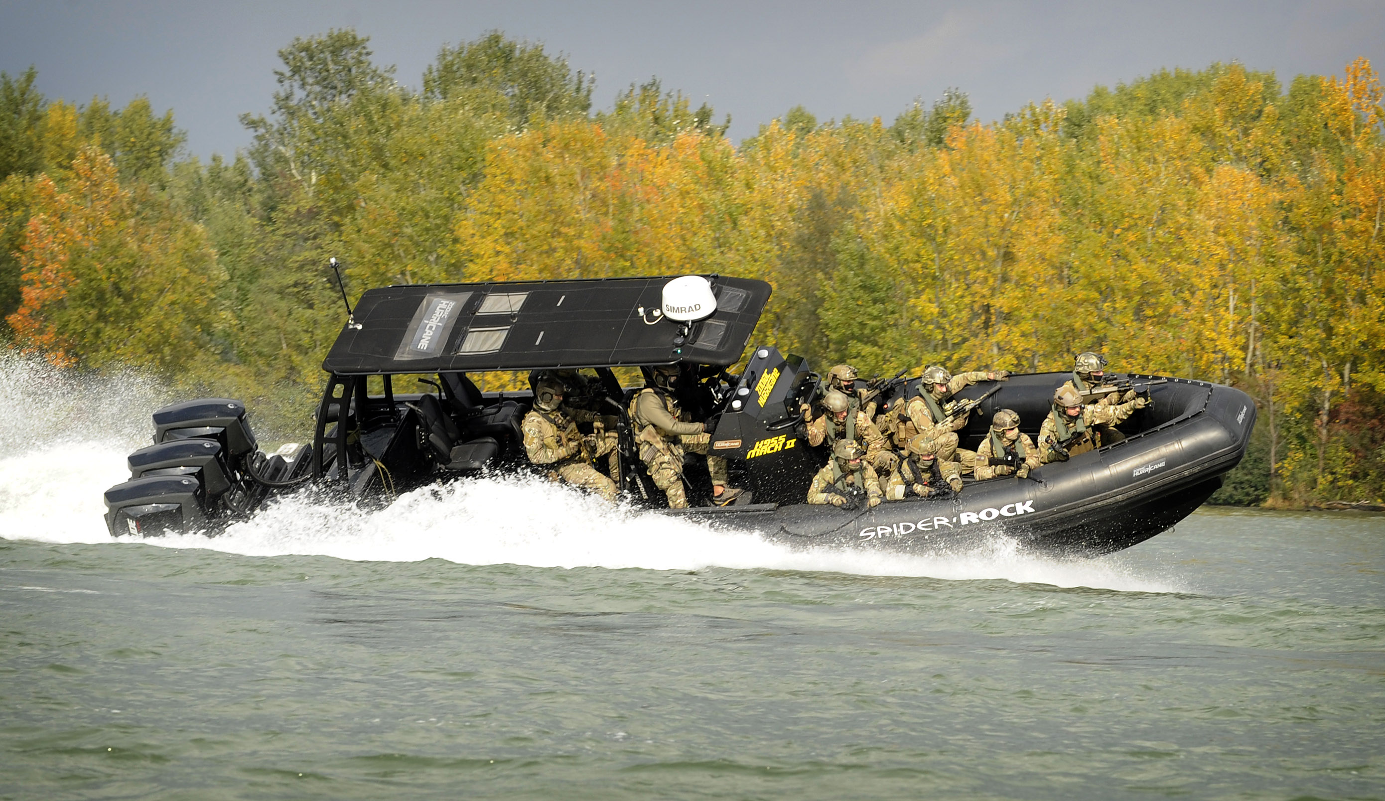 Jagdkommando-Soldaten beim Training in einem Speed-Boot.